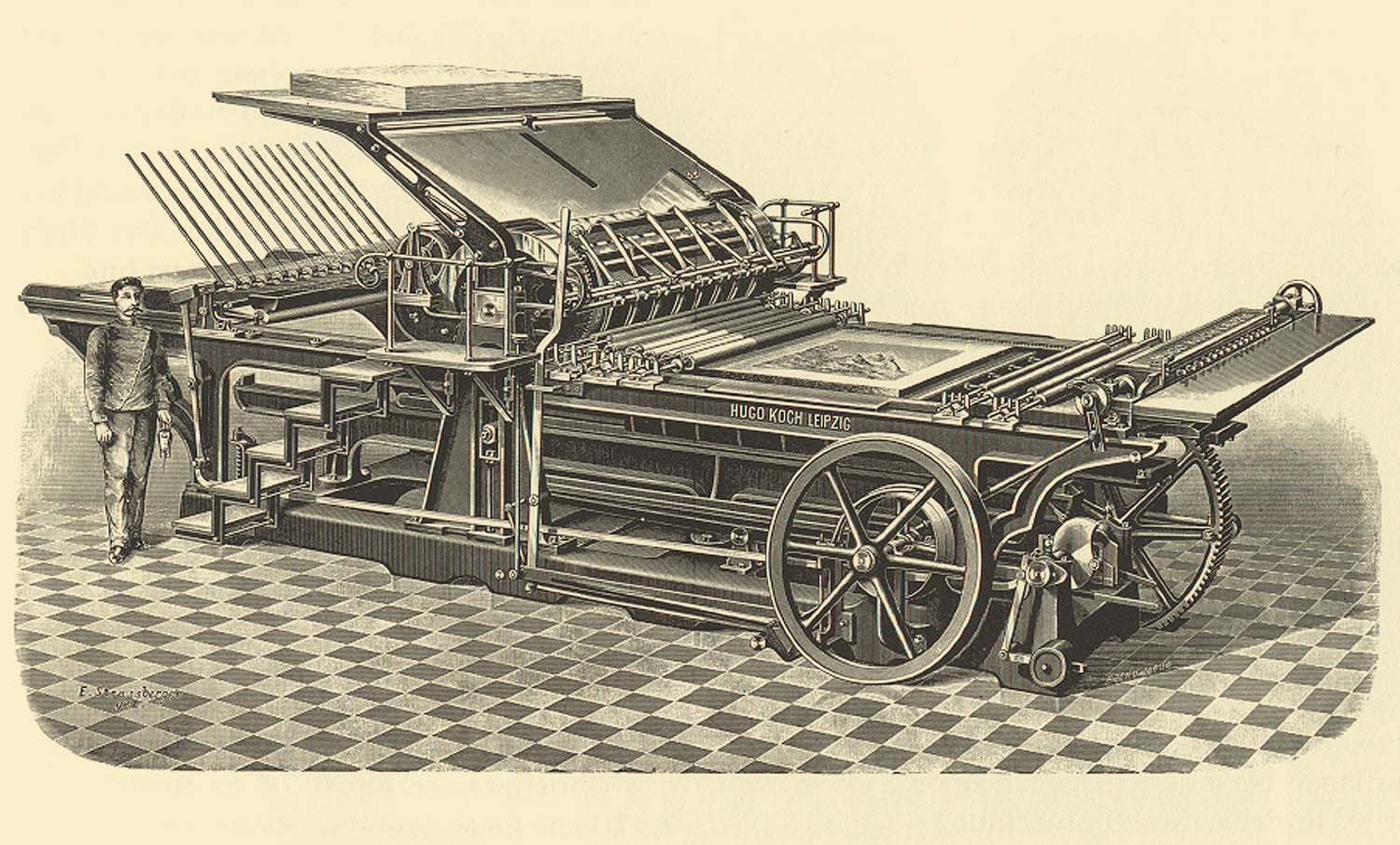 Steindruckschnellpresse von Hugo Koch, um 1880